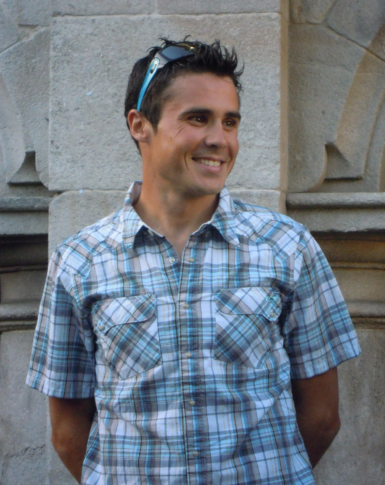 Xavier Gómez Noya na benvida organizada polo concello de Pontevedra aos cinco Galegos nos Xogos Olímpicos de 2012 vinculados á vila